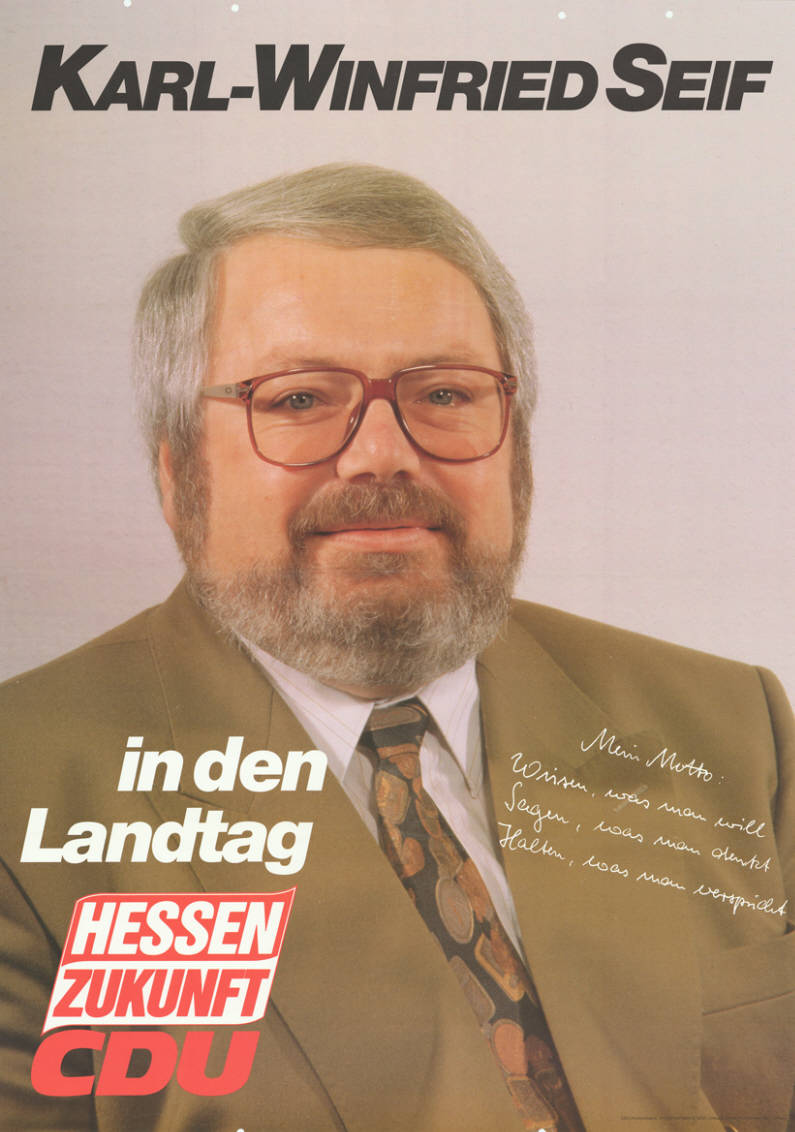 Karl-Winfried Seif in den Landtag Mein Motto: Wissen, was man will Sagen, was man denkt Halten, was man verspricht Hessen Zukunft CDU Abbildung: Porträtfoto Plakatart: Kandidaten-/Personenplakat mit Porträt Auftraggeber: CDU-KV Limburg-Weilburg, Limburg Drucker_Druckart_Druckort: Pallottinerdruck, Limburg Objekt-Signatur: 10-007 : 812 Bestand: Landtagswahlplakate Hessen (10-007) GliederungBestand10-18: Landtagswahlplakate Hessen (10-007) » CDU Lizenz: KAS/ACDP 10-007 : 812 CC-BY-SA 3.0 DE